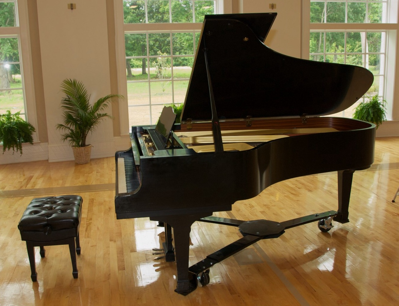 Yamaha grand piano, Piano Recital 2012 piano 2577